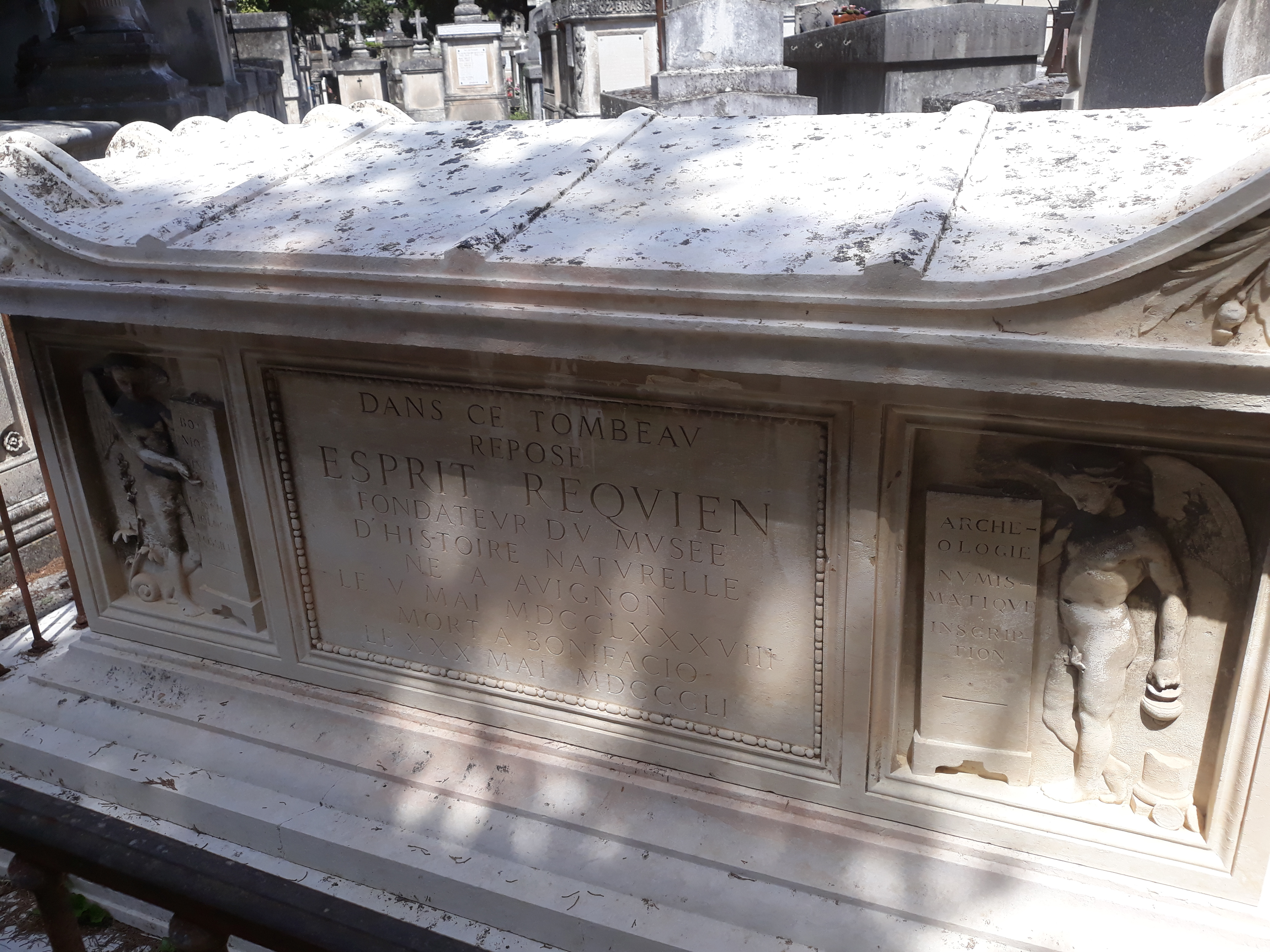 Das Grab des französischen Naturforsches Esprit Requien auf dem Cimetière Saint-Véran in Avignon.